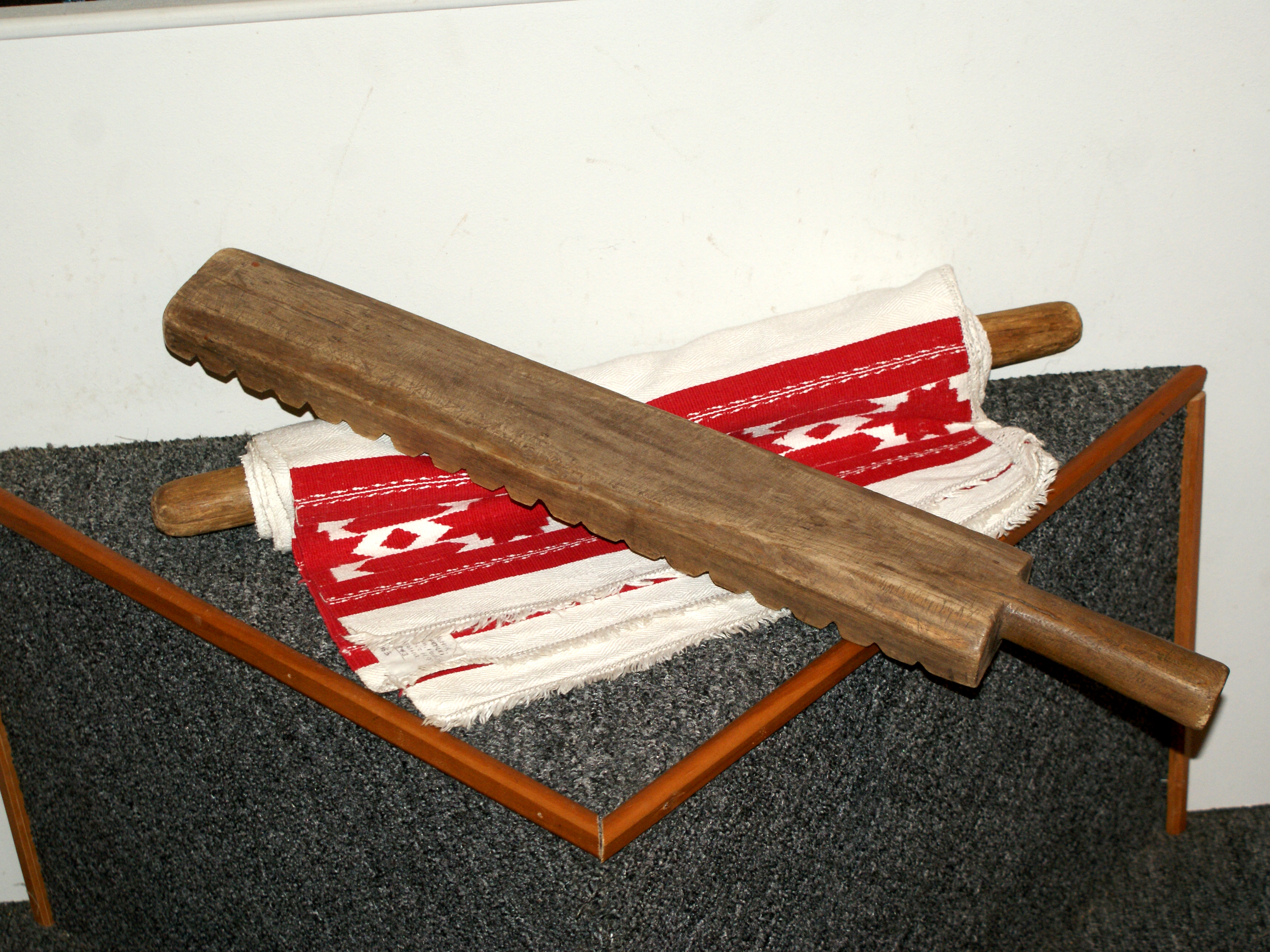 Валёк і пральнік